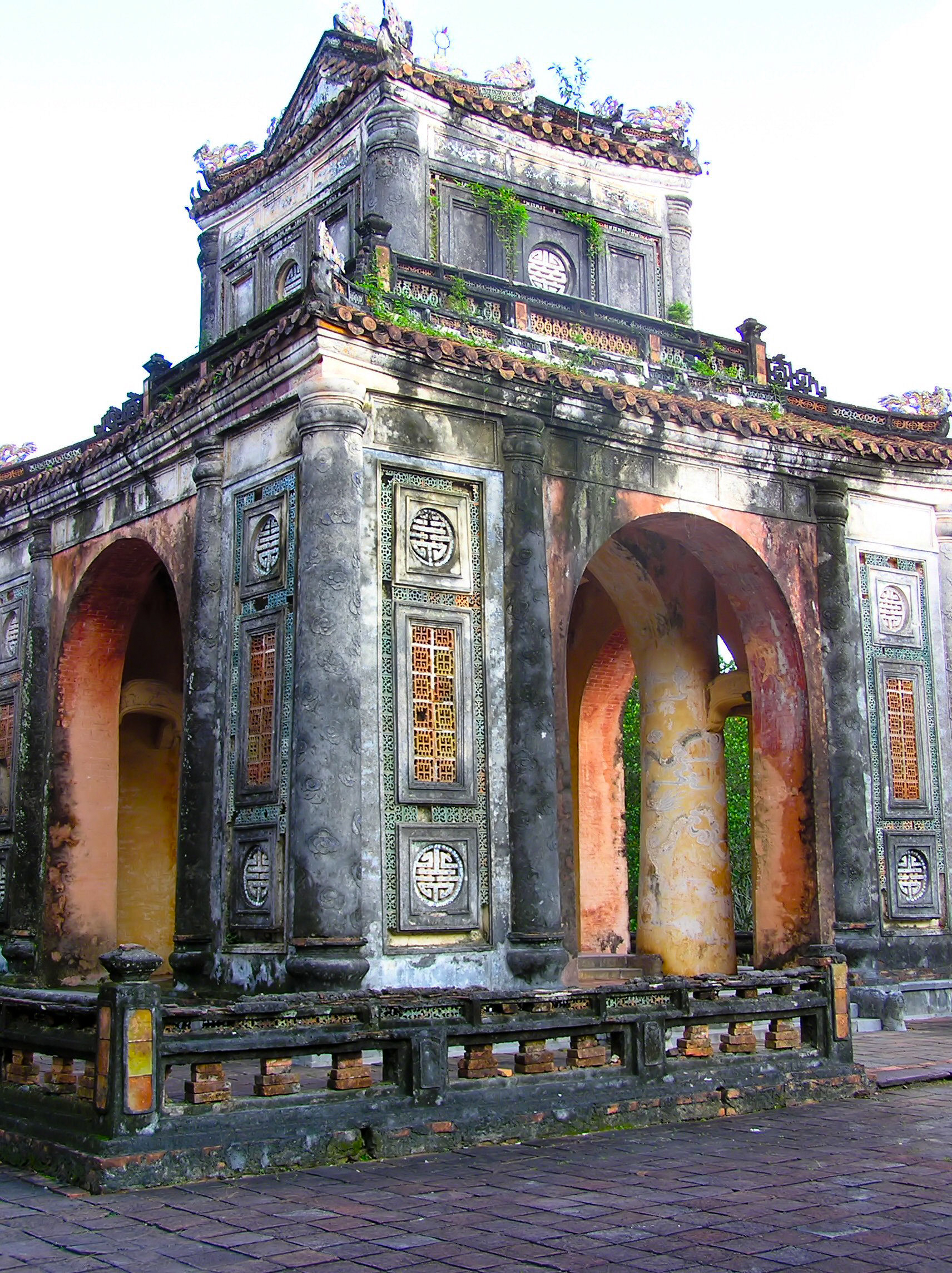 Vietnam - Hué - Pavillon de la stèle au domaine du Tombeau de l'empereur Tu Duc